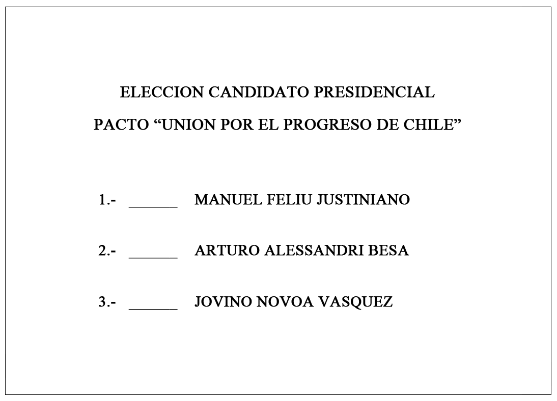 Voto utilizado en la convención presidencial de la Unión por el Progreso de Chile el 8 de agosto de 1993. Basado en imágenes aparecidas en Estado Nacional de TVN. Este voto fue el utilizado por los delegados asistentes a la convención para elegir a su candidato presidencial.